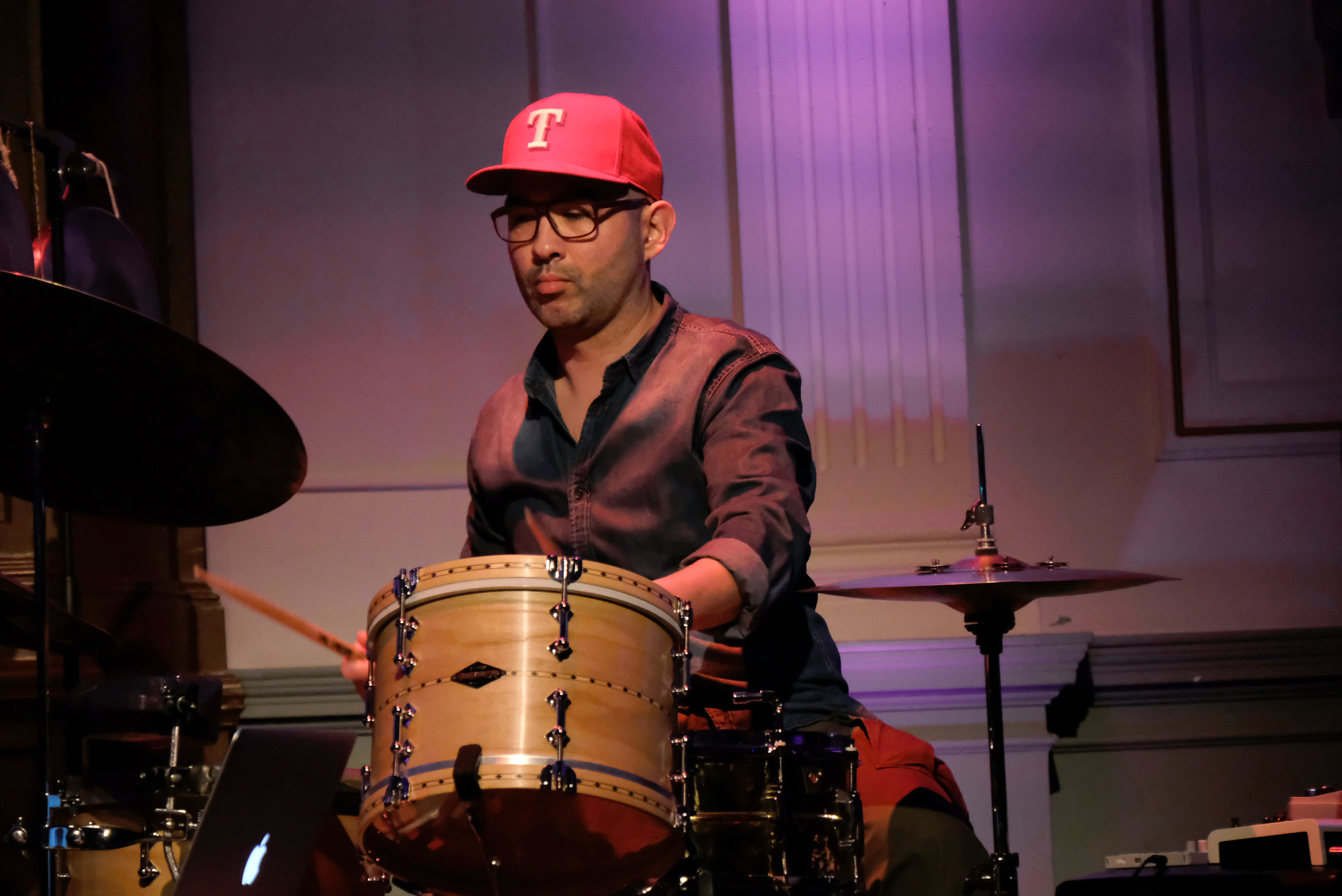 Yonga Sun